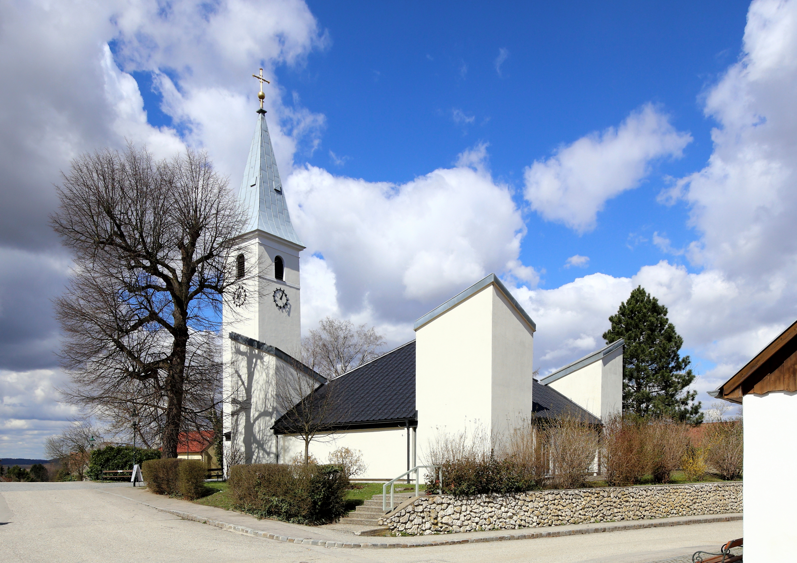 Südostansicht der katholischen Pfarrkirche hl. Vitus in Würnitz, ein Ortsteil der niederösterreichischen Marktgemeinde Harmannsdorf. Die Kirche wurde 1971 nach Plänen des Architekten Erwin Plevan unter Einbezug des Kirchturmes vom Vorgängerbau errichtet.